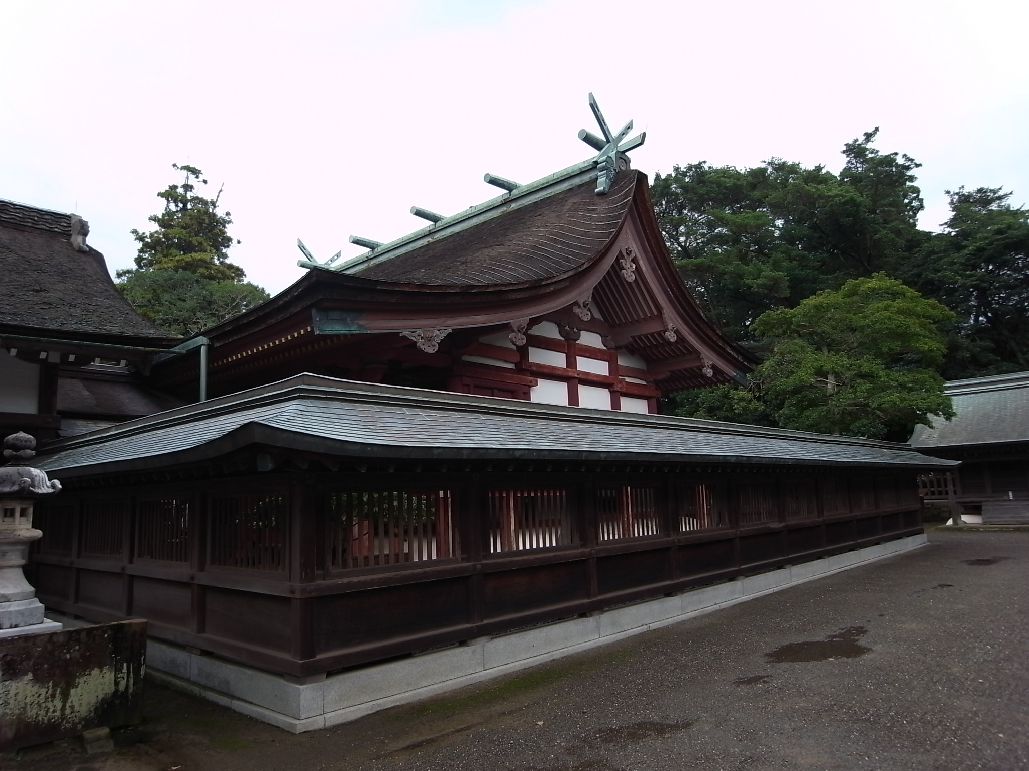 福岡県宗像市、宗像大社本殿